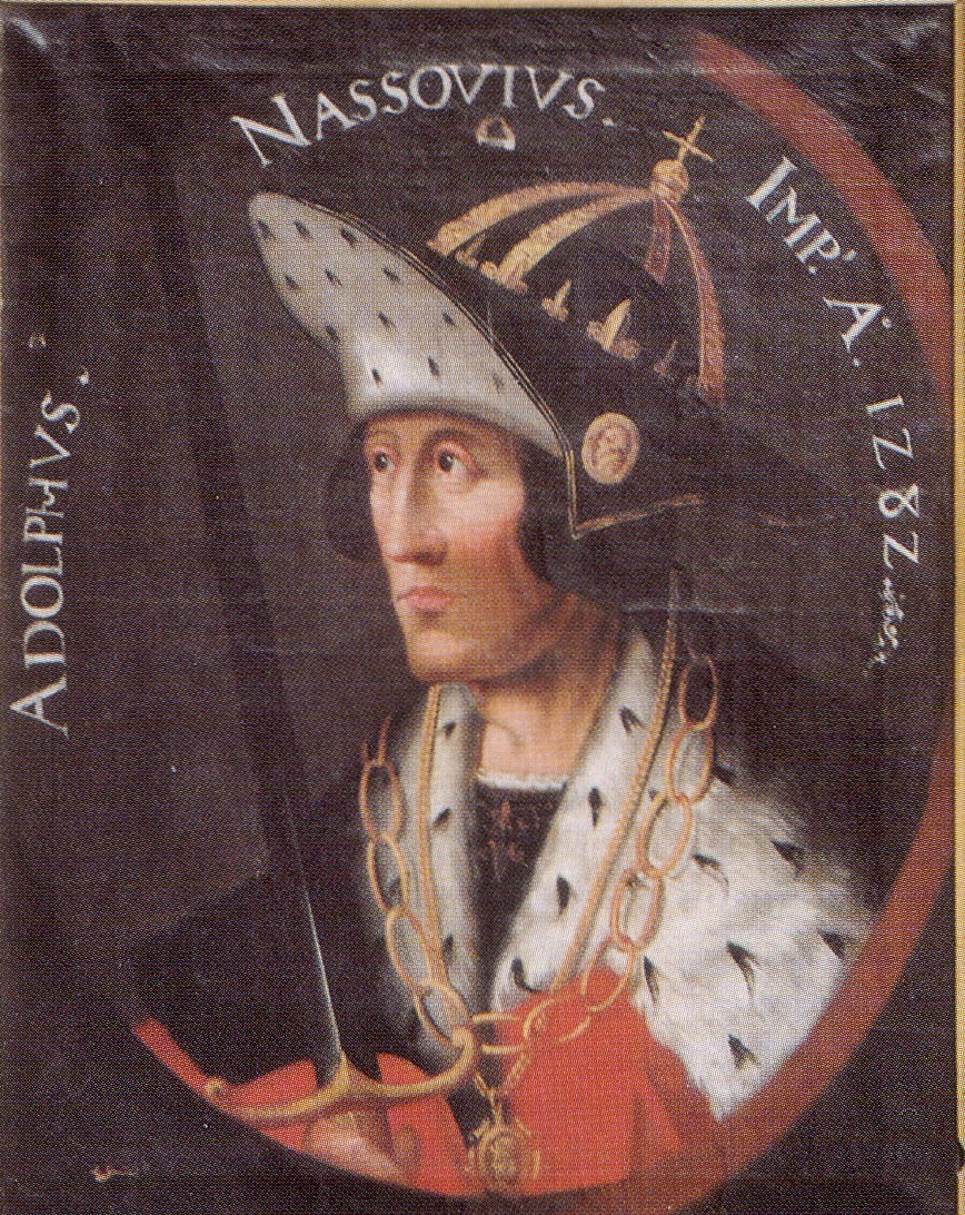 König Adolf von Nassau (1250-1298), Großherzog Jean von Luxemburg